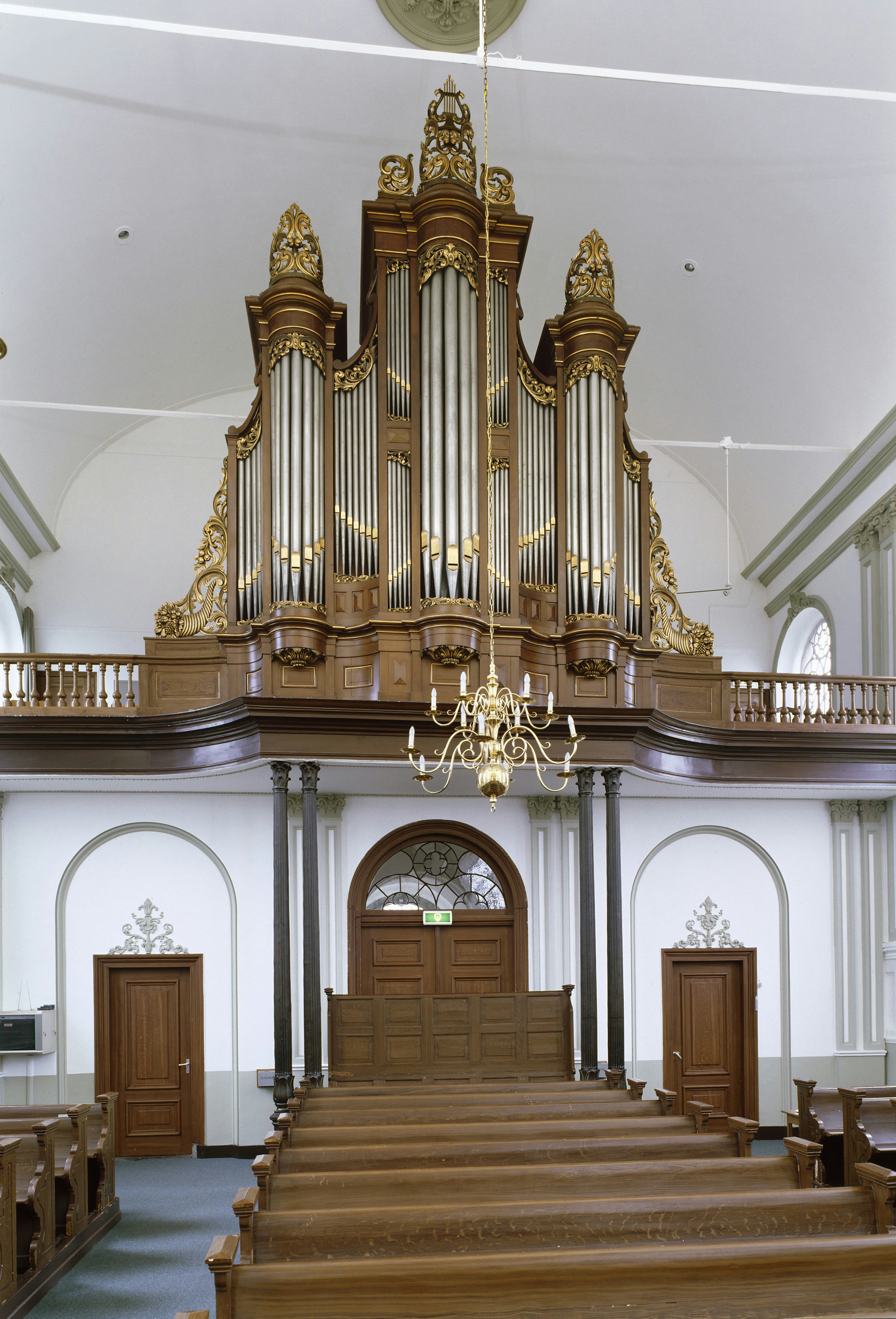 Nederlands Hervormde Kerk: Intenieur, aanzicht orgel, orgelnummer 704 (opmerking: Gefotografeerd voor Het Historische Orgel in Nederland 1872-1878, bladzijde 276)